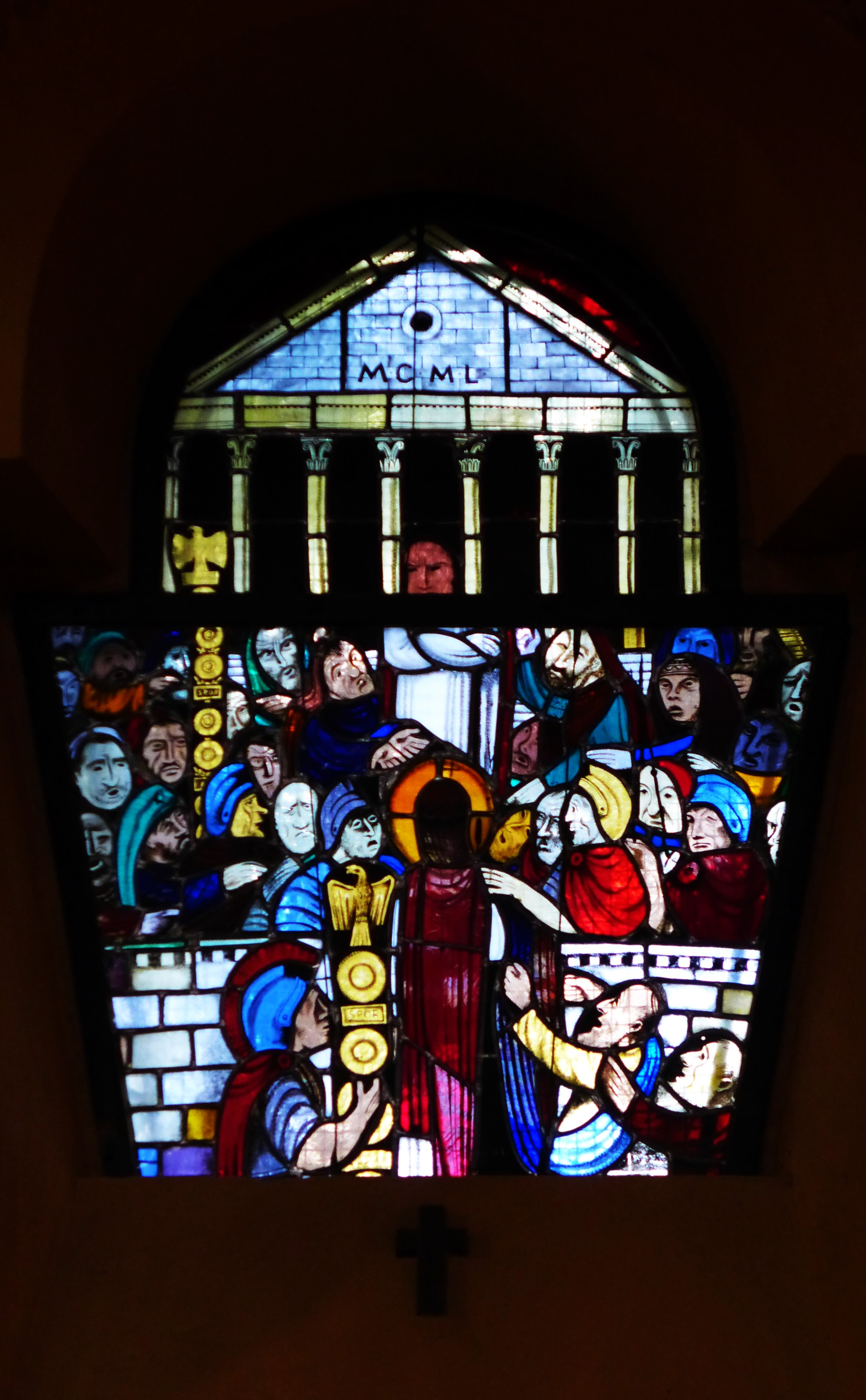 Christkönig-Kirche (Saarbrücken), Kreuzwegdarstellung, Christus vor Pilatus